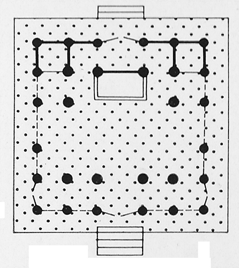 Layout of Seihaku-ji, Yamanashi